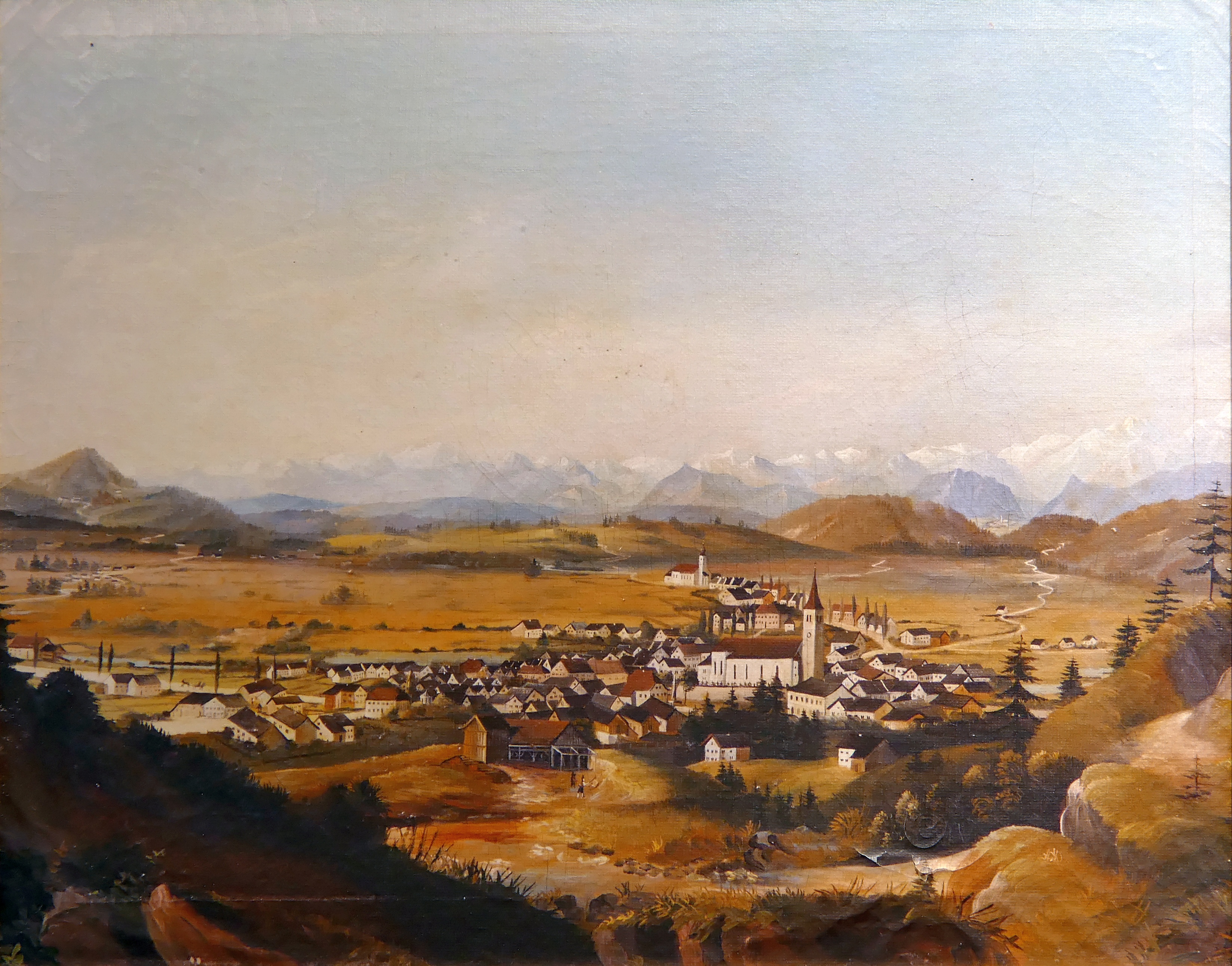 Nikolaus Gumberger (1822–1898): Peiting im Bezirk Amt Schongau, 1888. Museum im Klösterle, Peiting. (Exakter Wortlaut der Bildlegende: „Peiting i. bez. Amt Schongau, anno 12.II.1888 von Nikolaus Gumberger“)